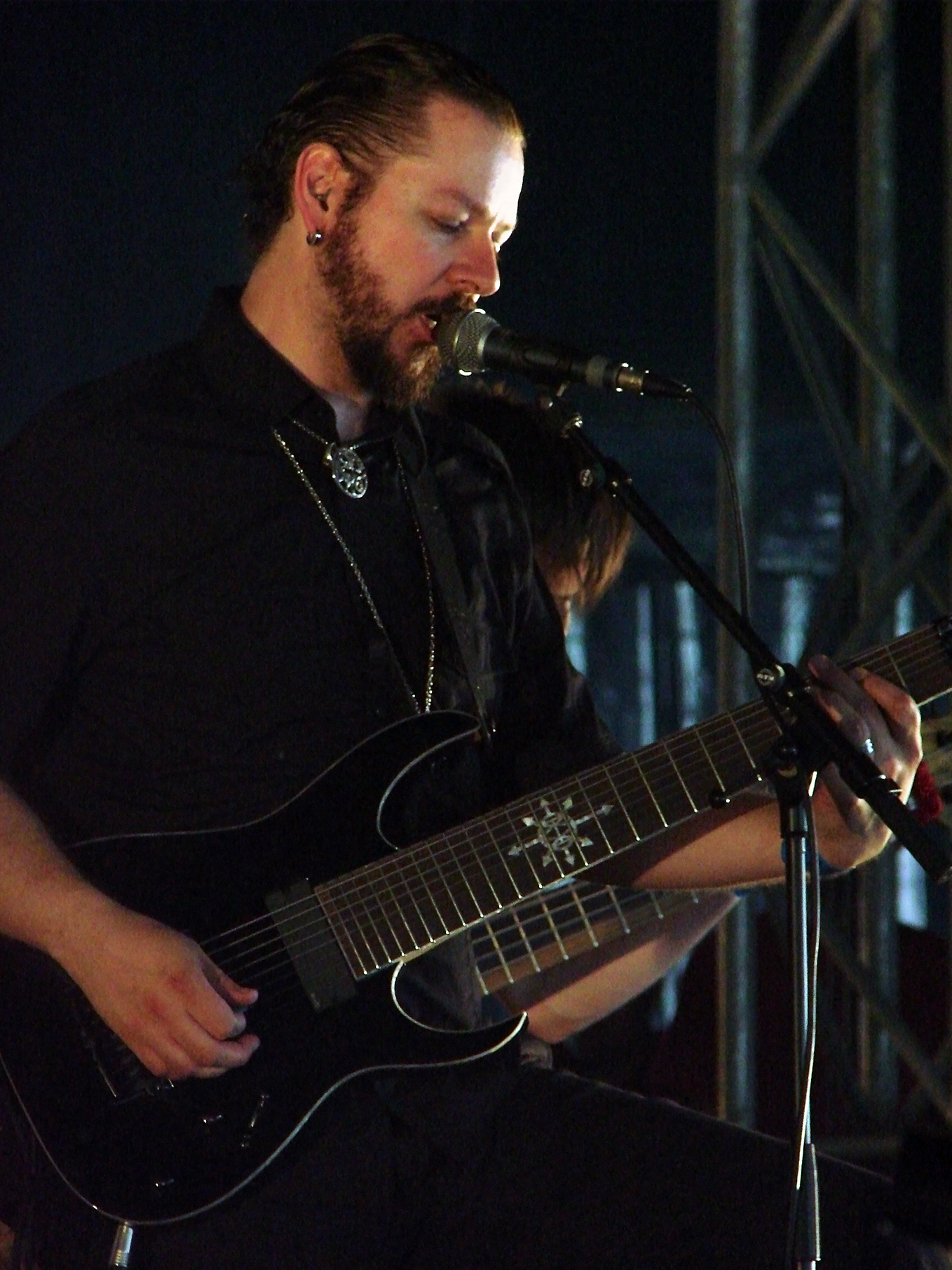 Ihsahn (Vegard Sverre Tveitan) au Hellfest 2010 à Clisson, le 18 Juin 2010.